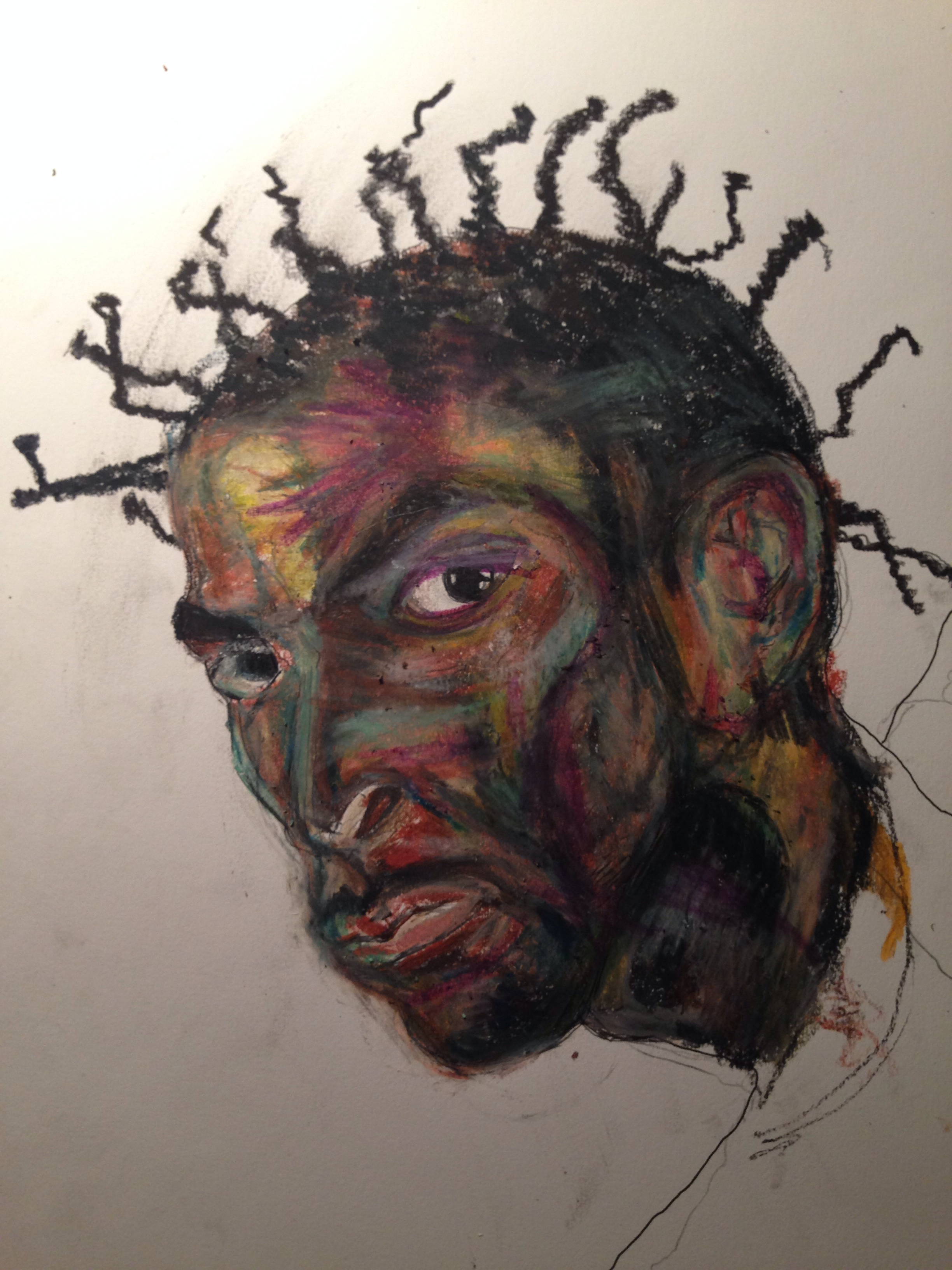 Desenhos animados de Sabotage em um papel desenhado em Graffiti